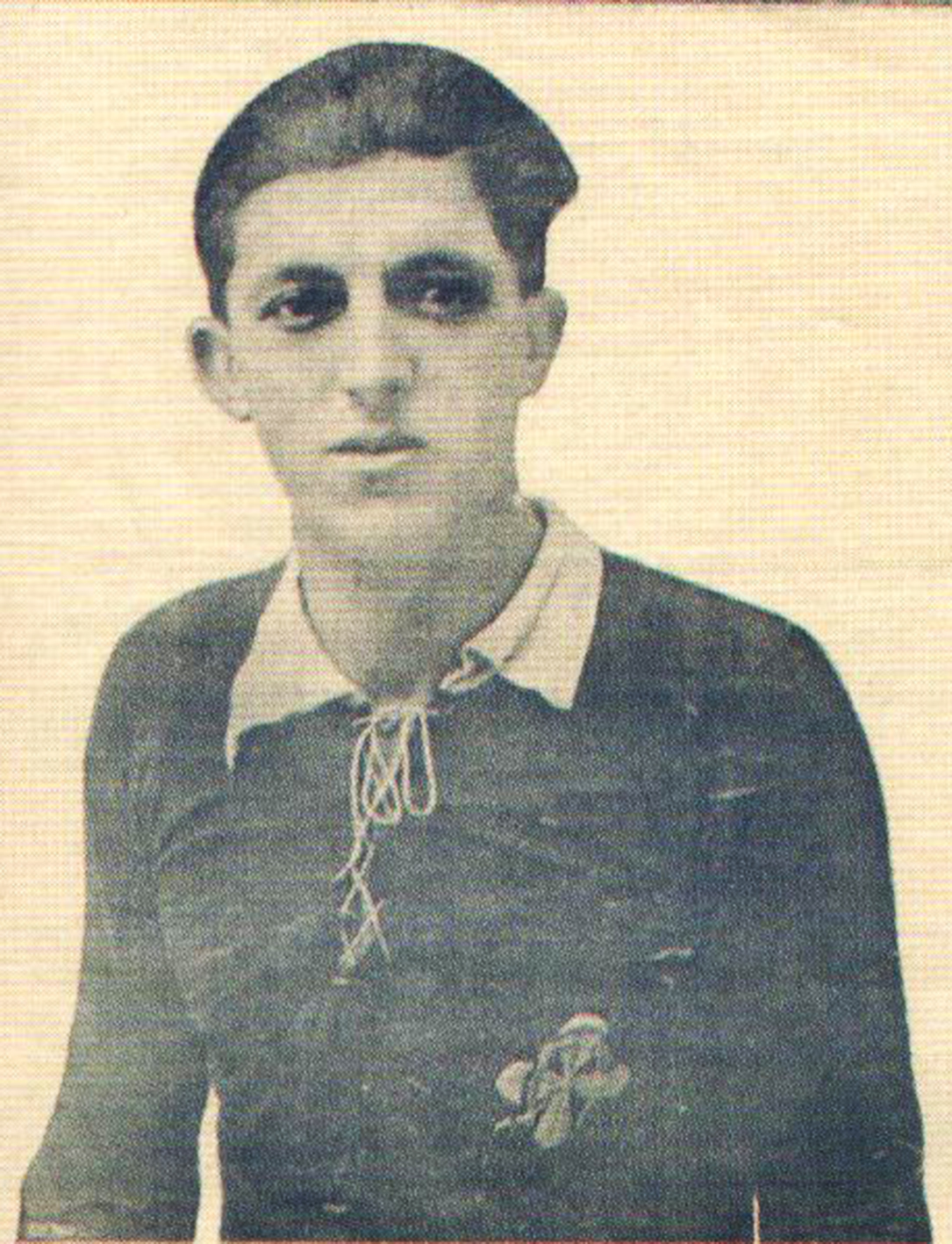 O Κώστας Ανδρεάδης παίκτης του ΠΑΟΚ